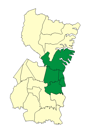 Ciudades que formaban parte originalmente de la Liga Deportiva Paranaense desd 1964 a 1980.